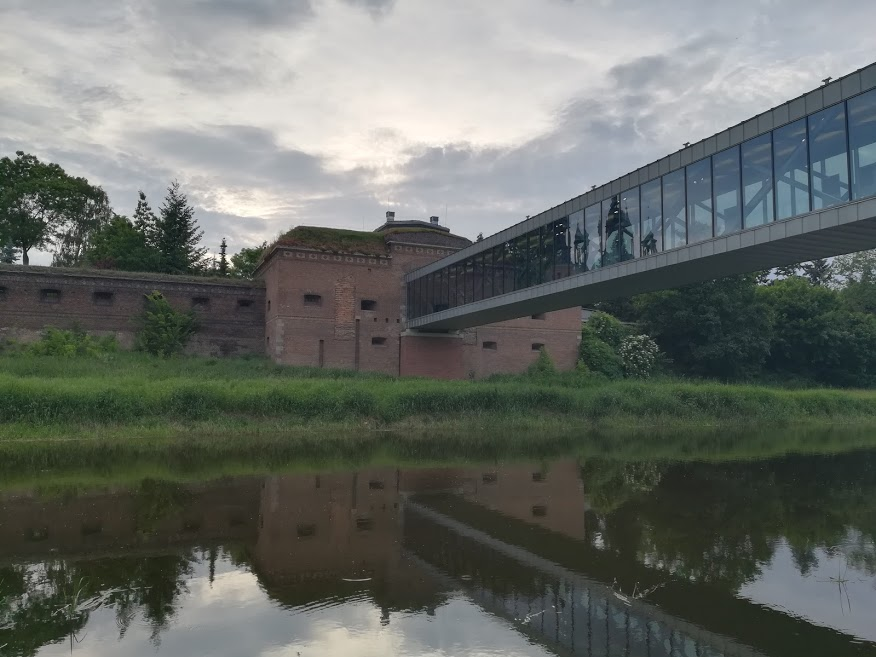 Кафедральный шлюз - вид со стороны амфитеатра Брамы Познани